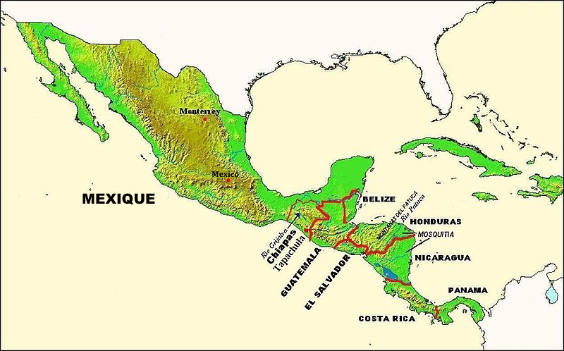 Carte du Mexique et des Caraïbes